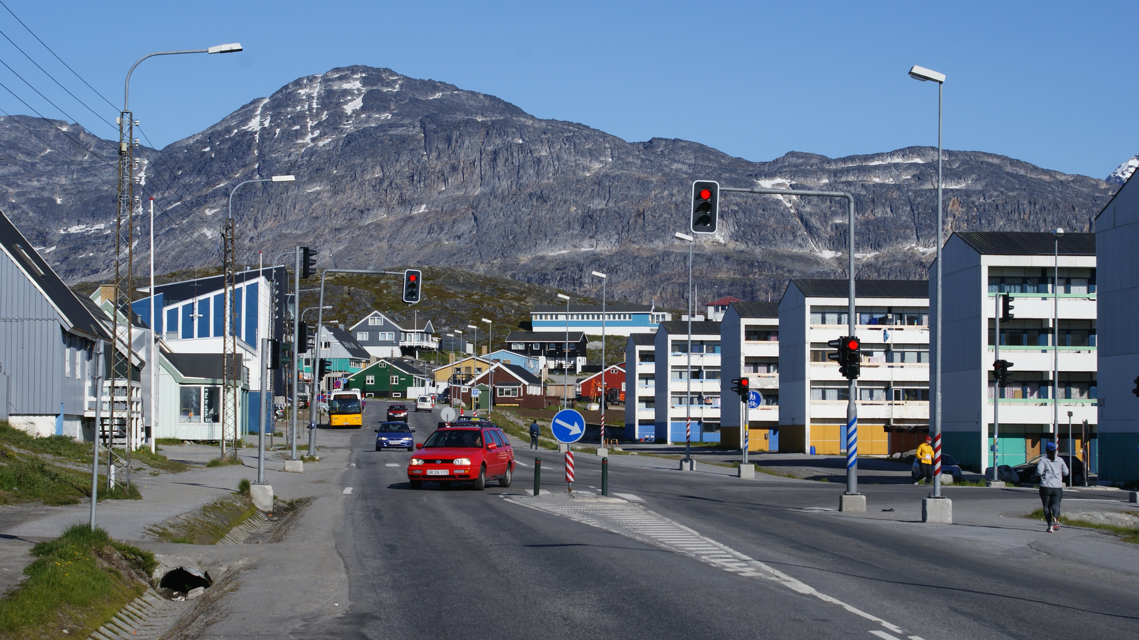 Nuuk Centrum, Greenland.